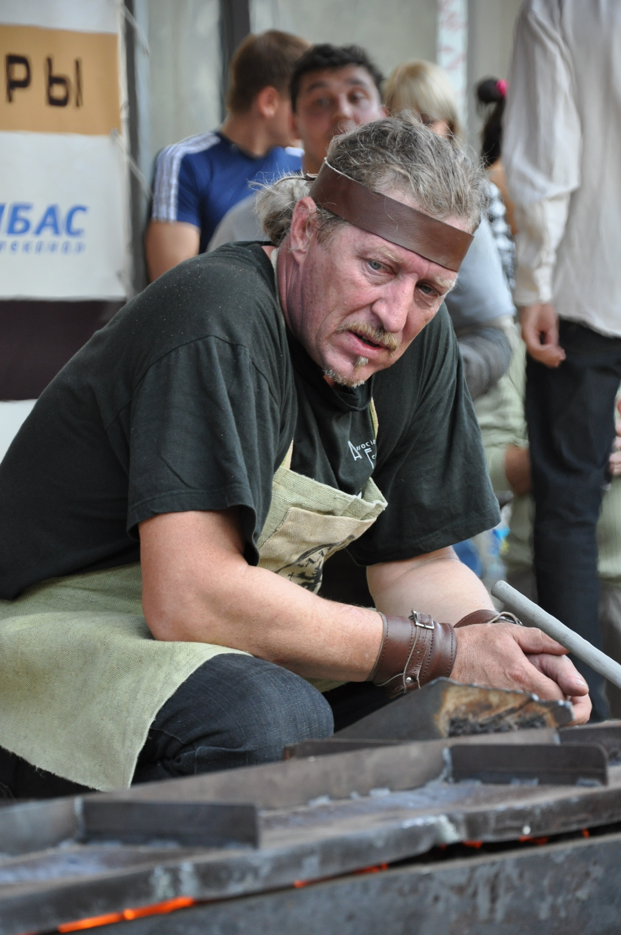 Выступление Дмитрия Халаджи на 12 кузнечном фестивале